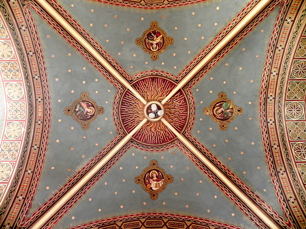 Santuario del Santissimo Crocifisso a Gorno - Dettaglio della volta centrale